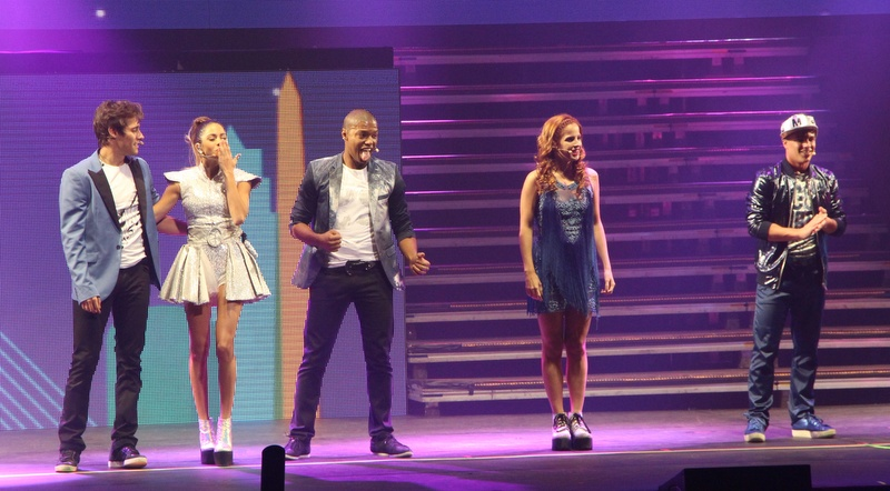 Violleta-015